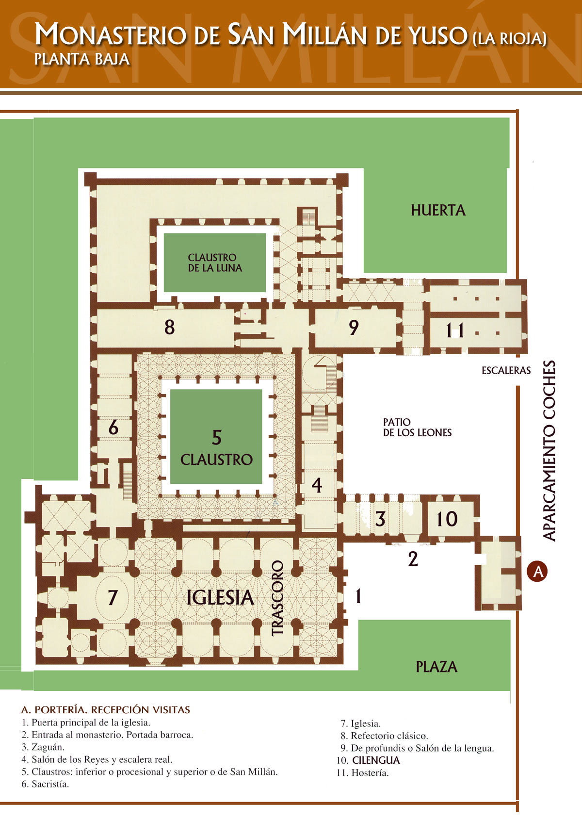 Plano del Monasterio de San Millán de Yuso